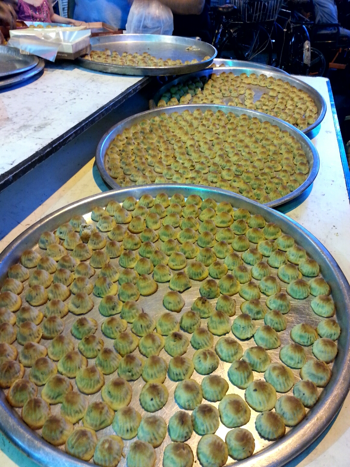 الميدان